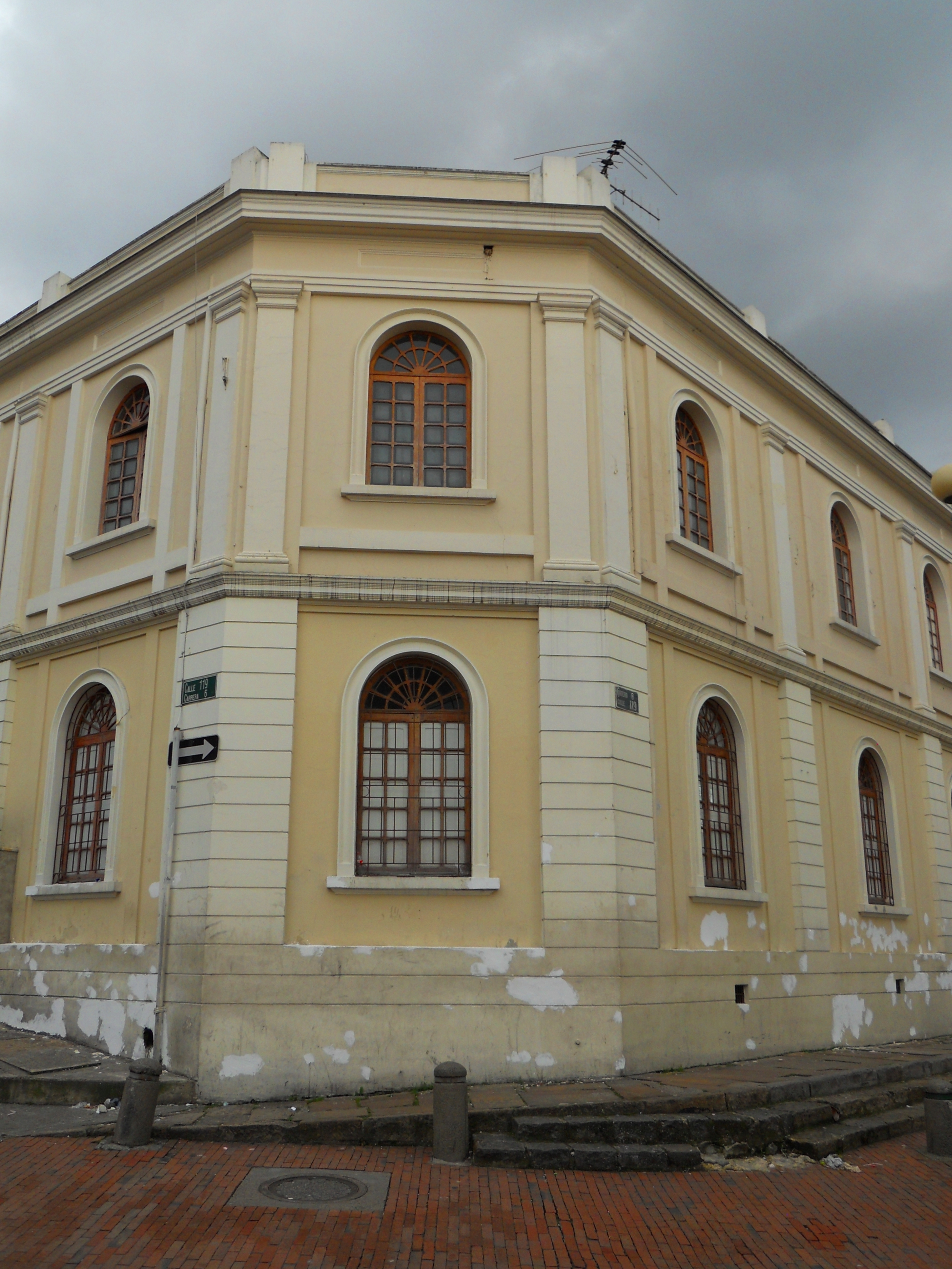 Usaquén carrera Sexta con calle 119, edificio situado en la zona nororiental de la plaza. Bogotá D. C.